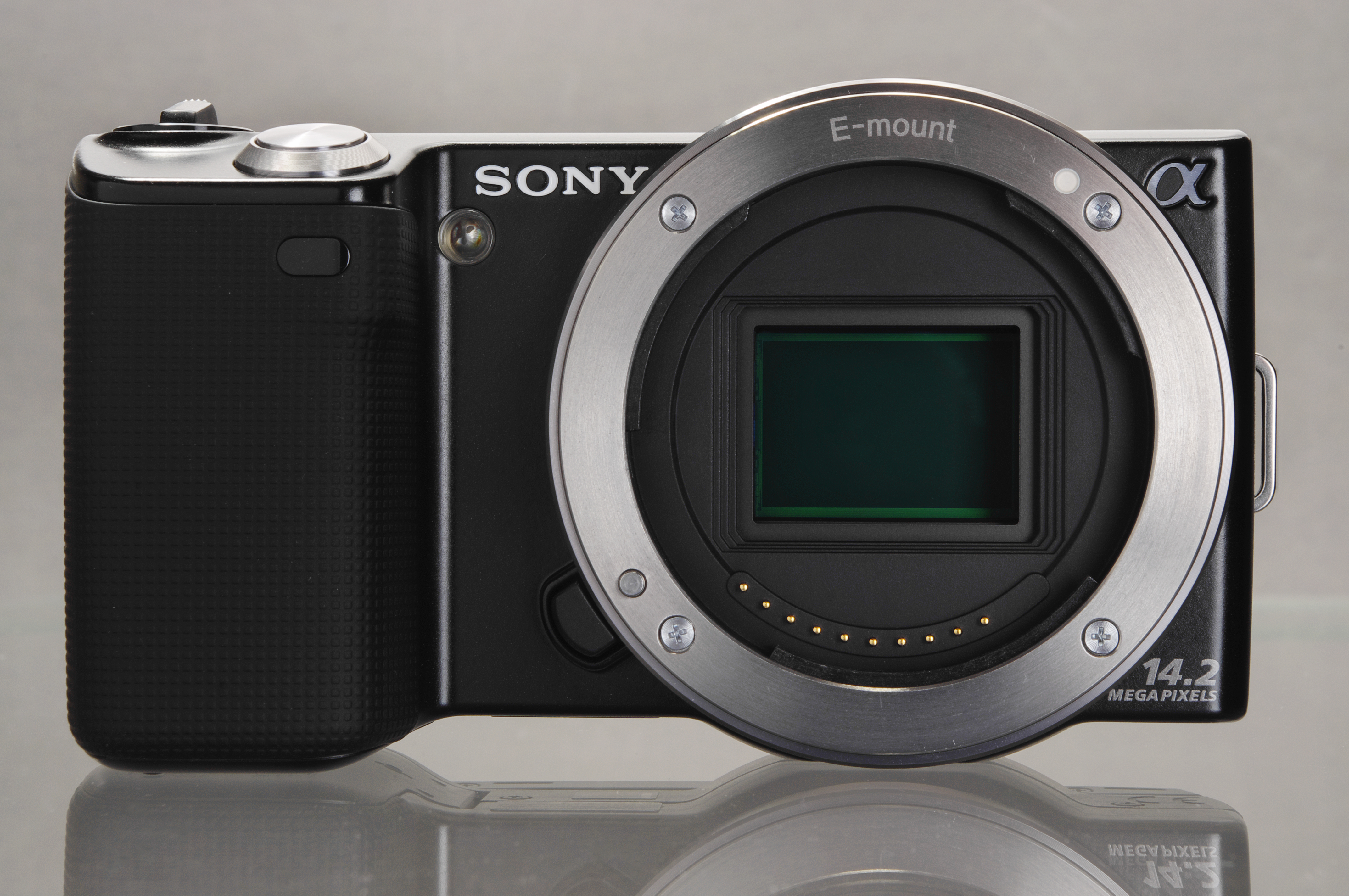 Sony NEX-5 Front ohne Objektiv, E-Bajonett, CMOS-Bildsensor